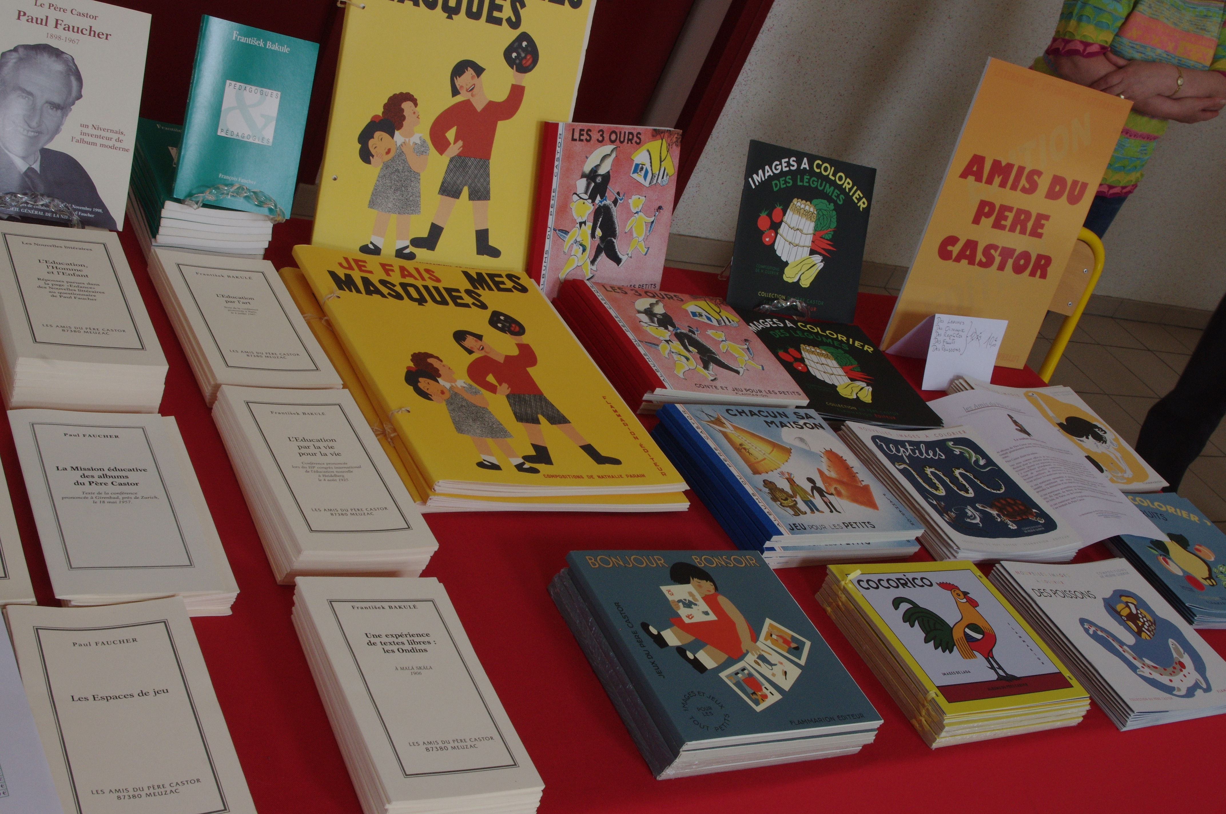 Séminaire Père Castor à Meuzac en juin 2012 – les archives